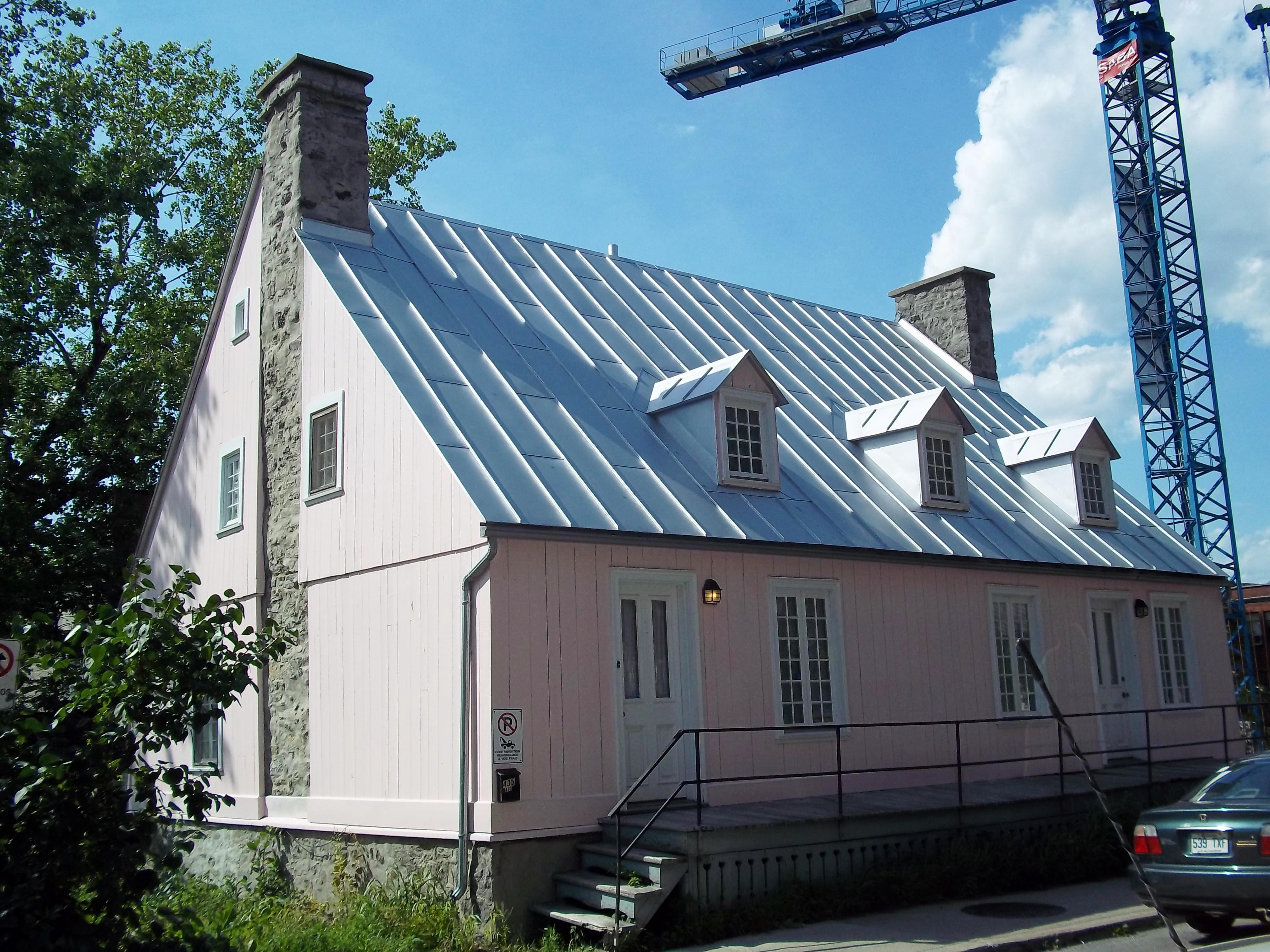 Maison Brossard-Gauvin, 433, rue Saint-Louis, Montréal